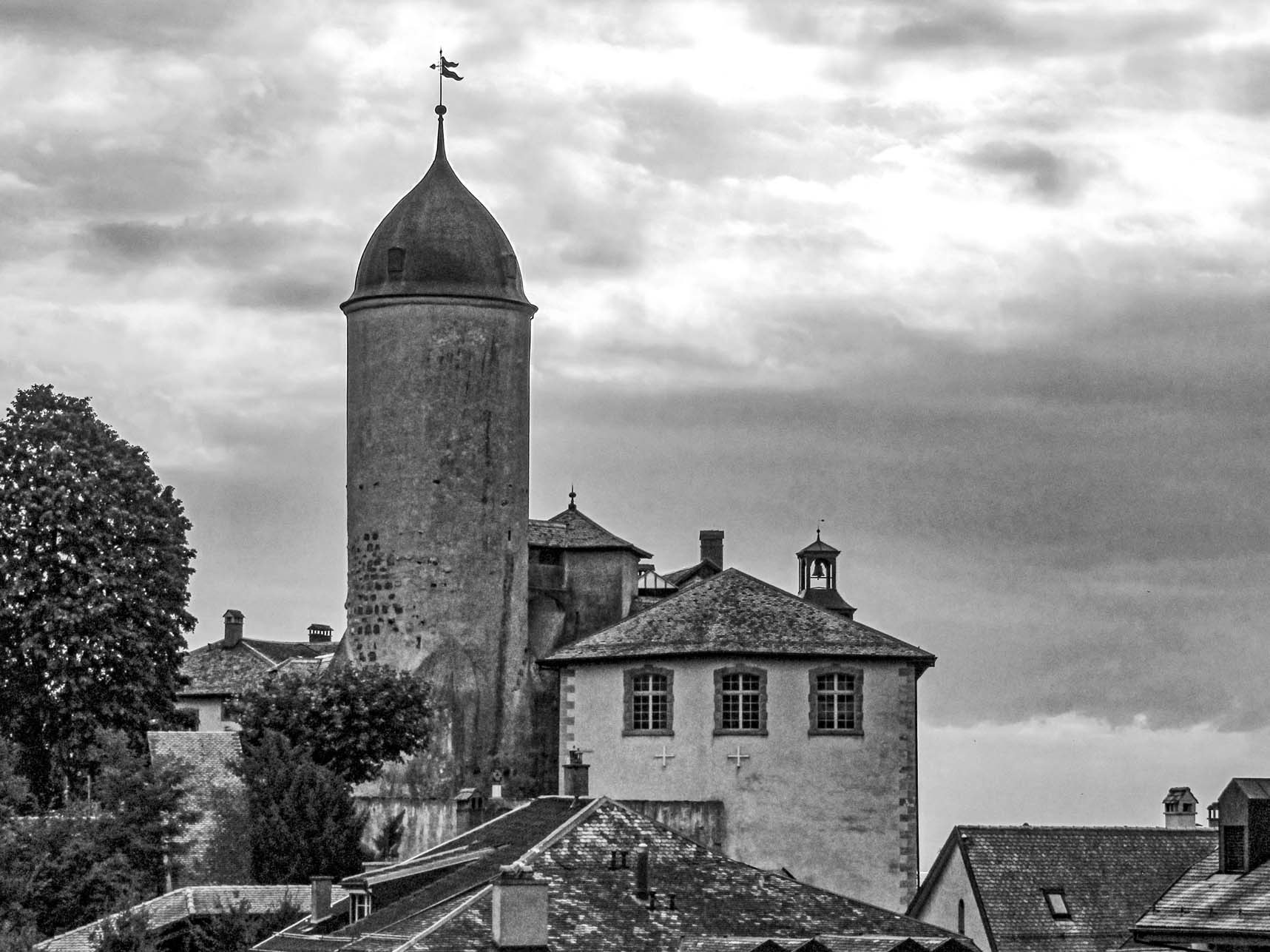 Château d'Aubonne vu de l'ouest